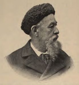 Francouzský šachista Arnous de Riviere